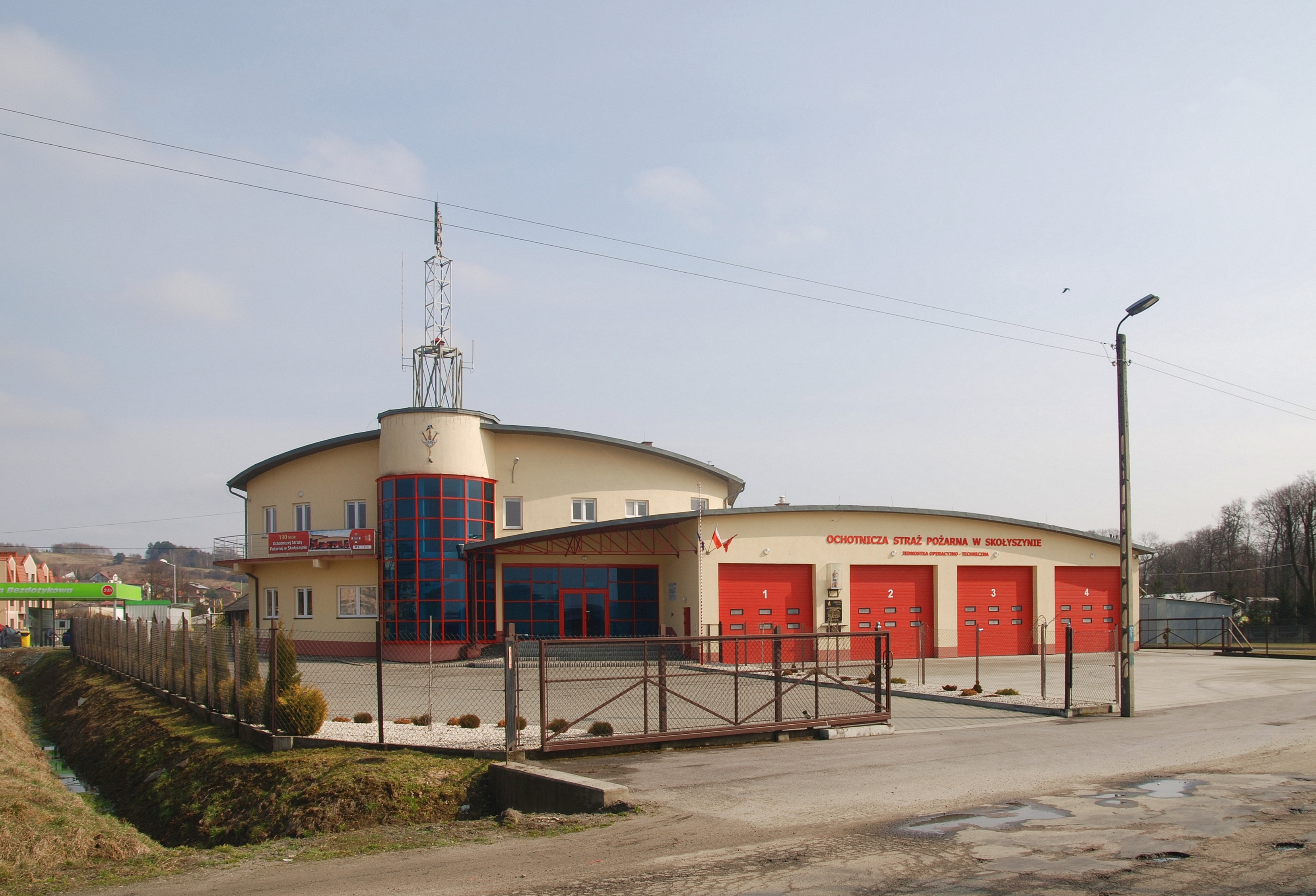 wieś Skołyszyn